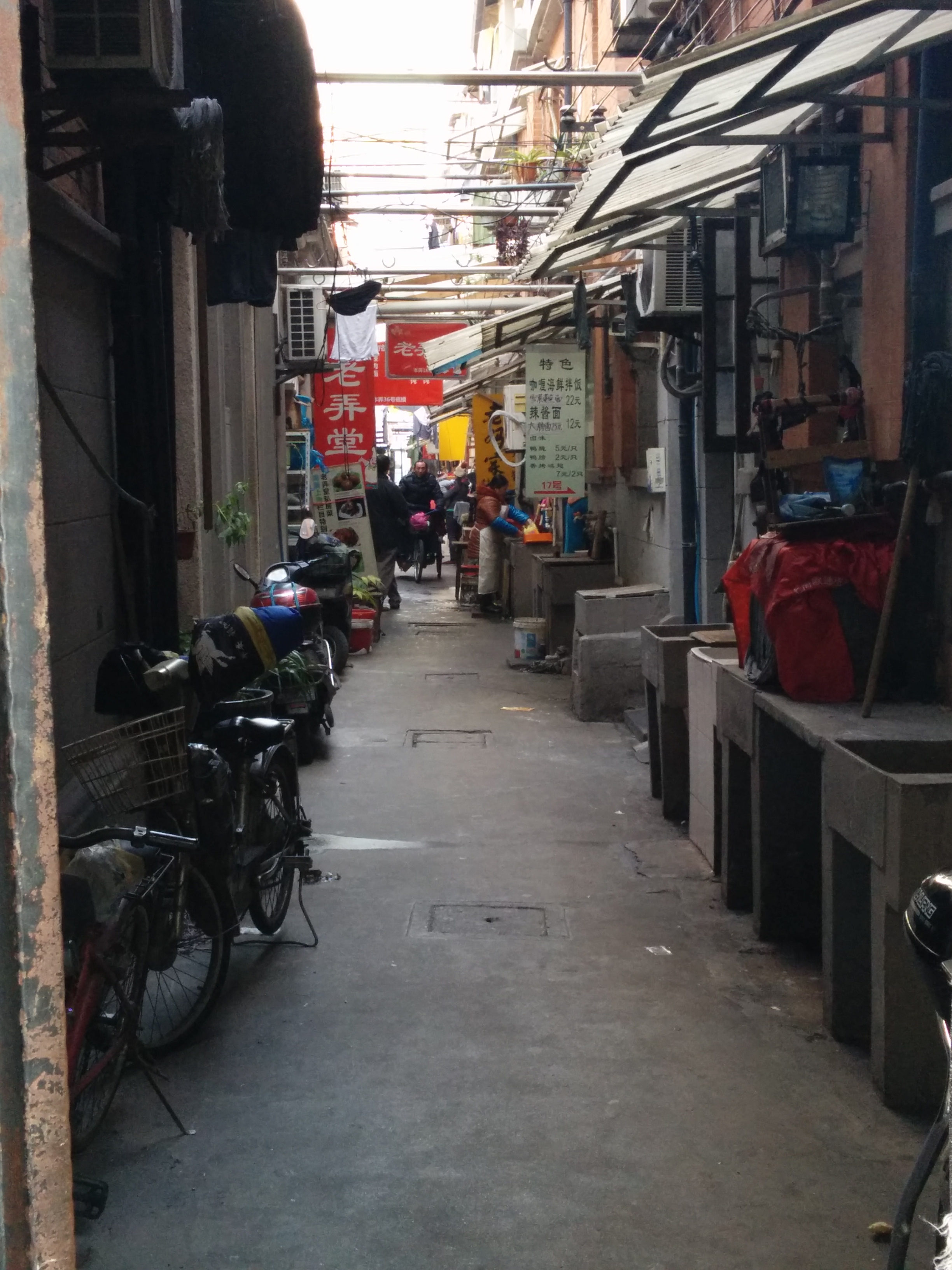 中文（中国大陆）: 尚贤坊的一条支弄